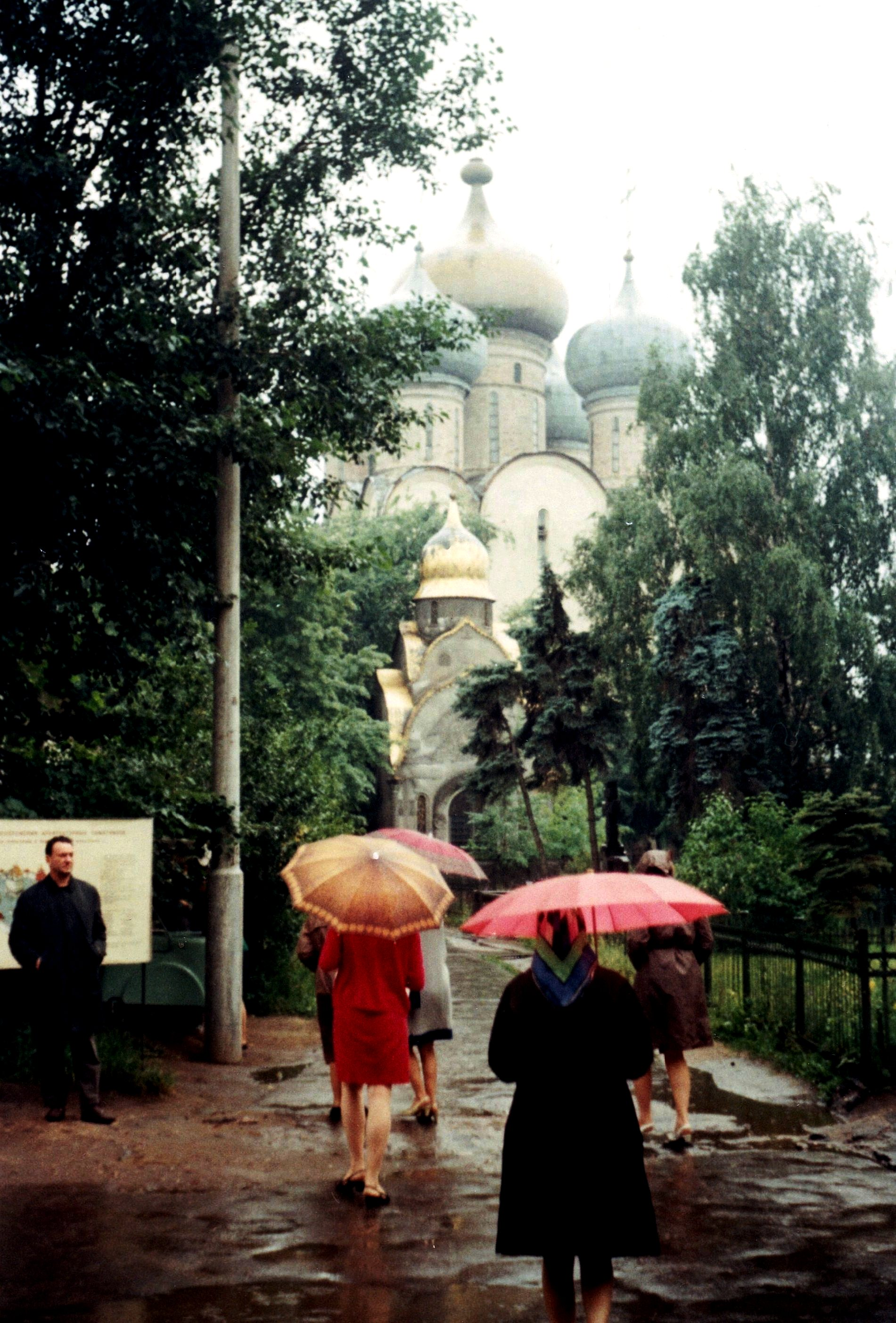 Nowodewitschi-Kloster, Moskau, Russland